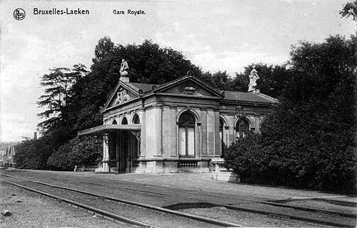 Bâtiment voyageurs de la gare du domaine royale de Laeken, gare privée qui était utilisée par la famille royale belge et ses visiteurs.